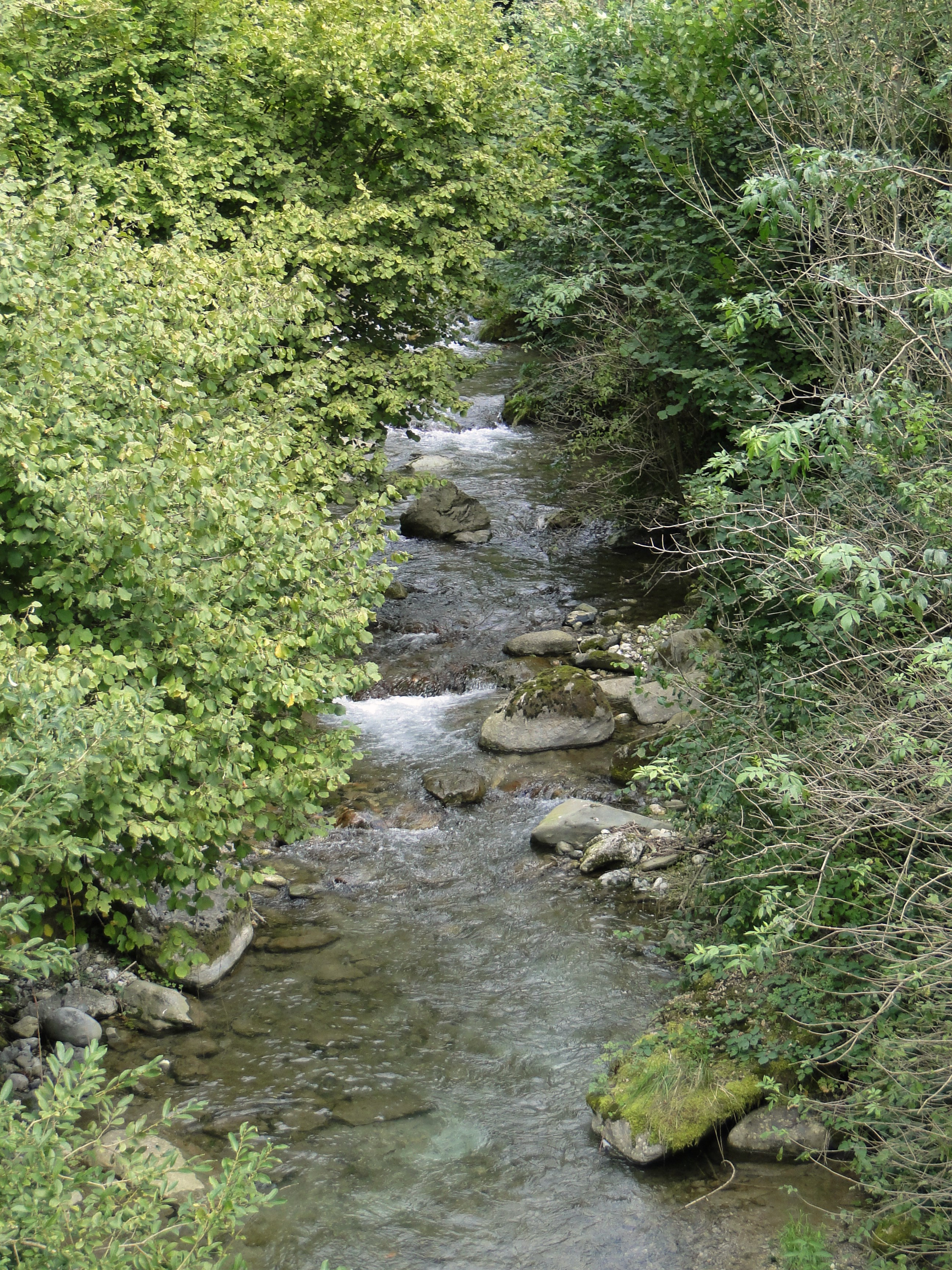 Villa d'Ogna (BG), torrente Ogna